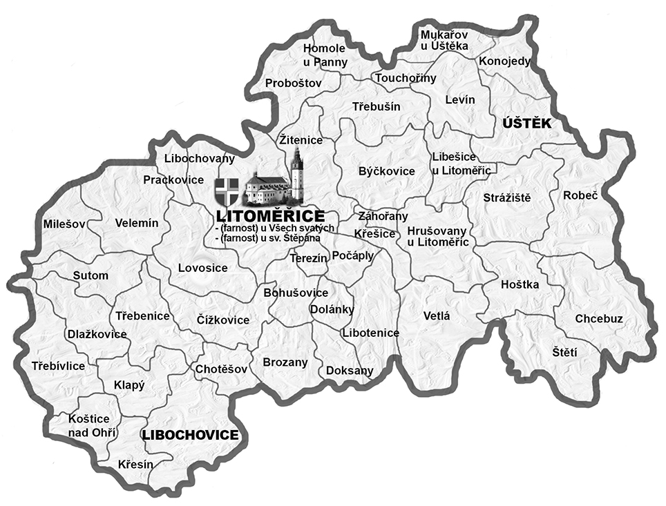 Diecéze litoměřická, litoměřický vikariát - farnosti